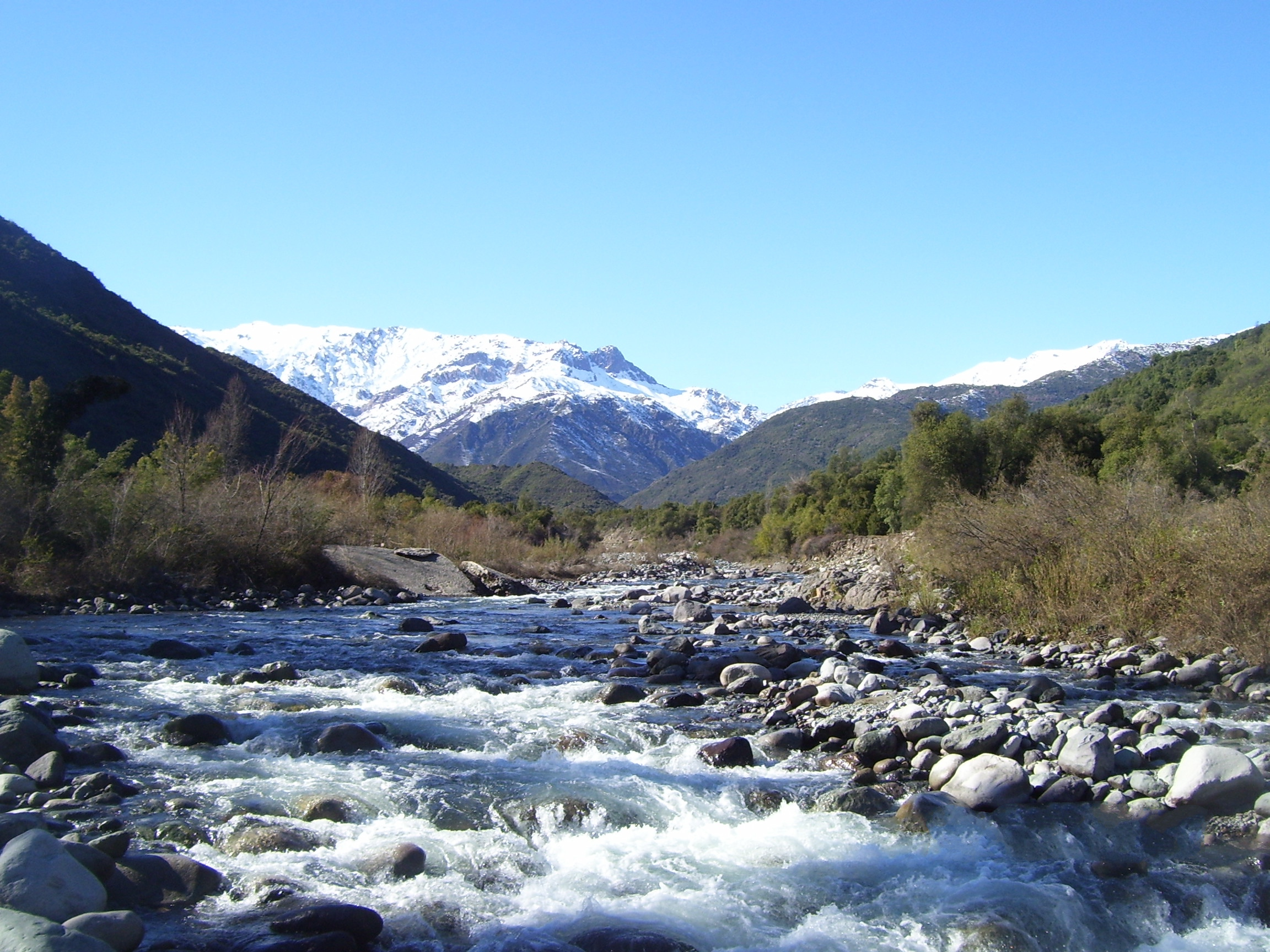 Río Claro en la Región de O'Higgins, a la altura de Las Nievas (comuna de Rengo).